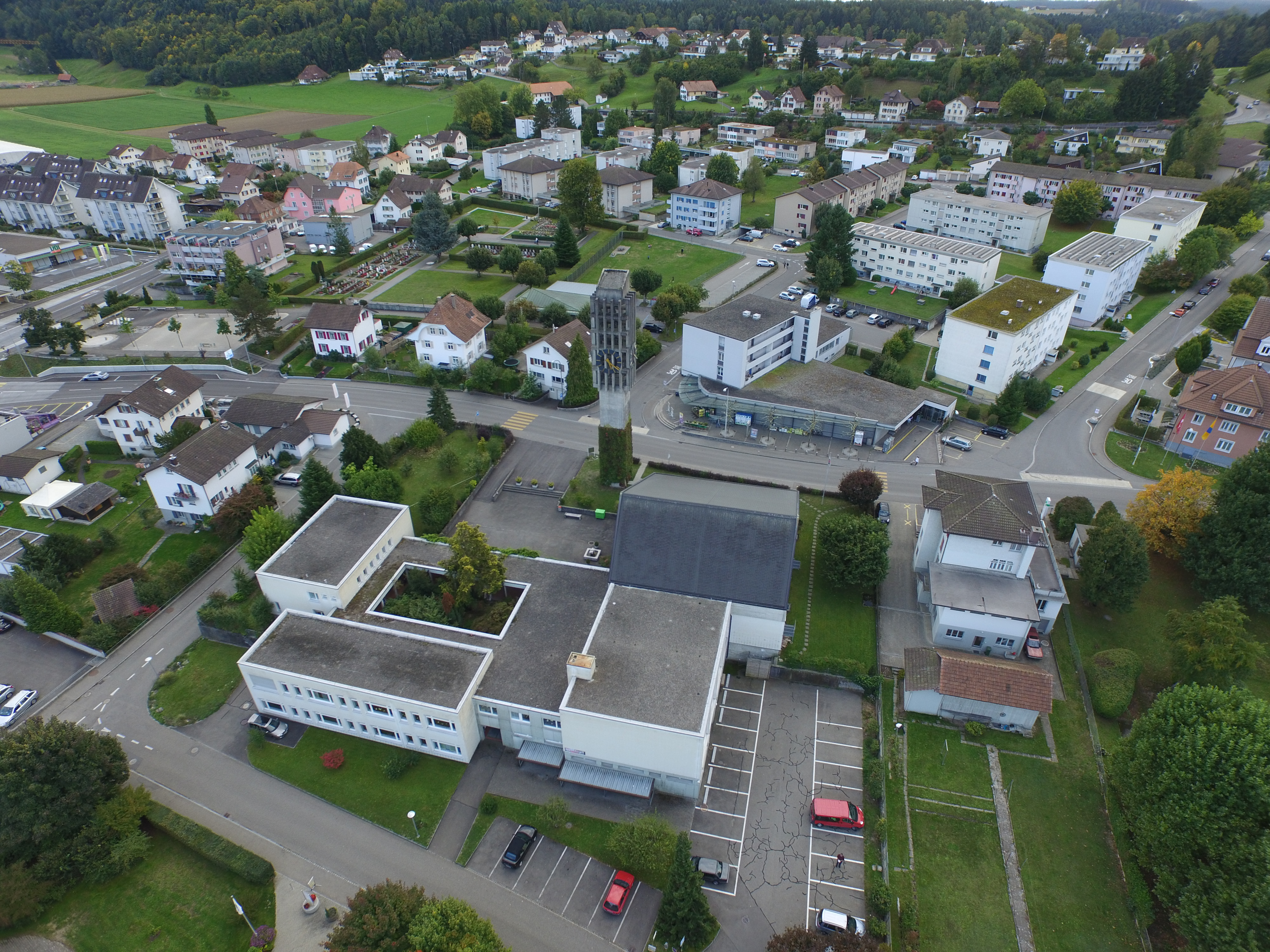 Kirche und Friedhof Strengelbach